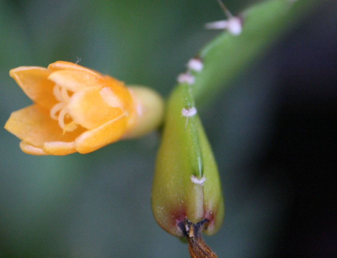 Pfeiffera_monacantha (Rhipsalideae; Cactaceae; Planta) kaktusz virága és fiatal termése